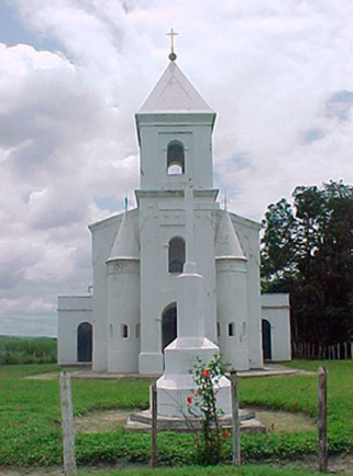 Imagem da Capela Santo Antônio localizada em Goiana - PE, em processo de reforma